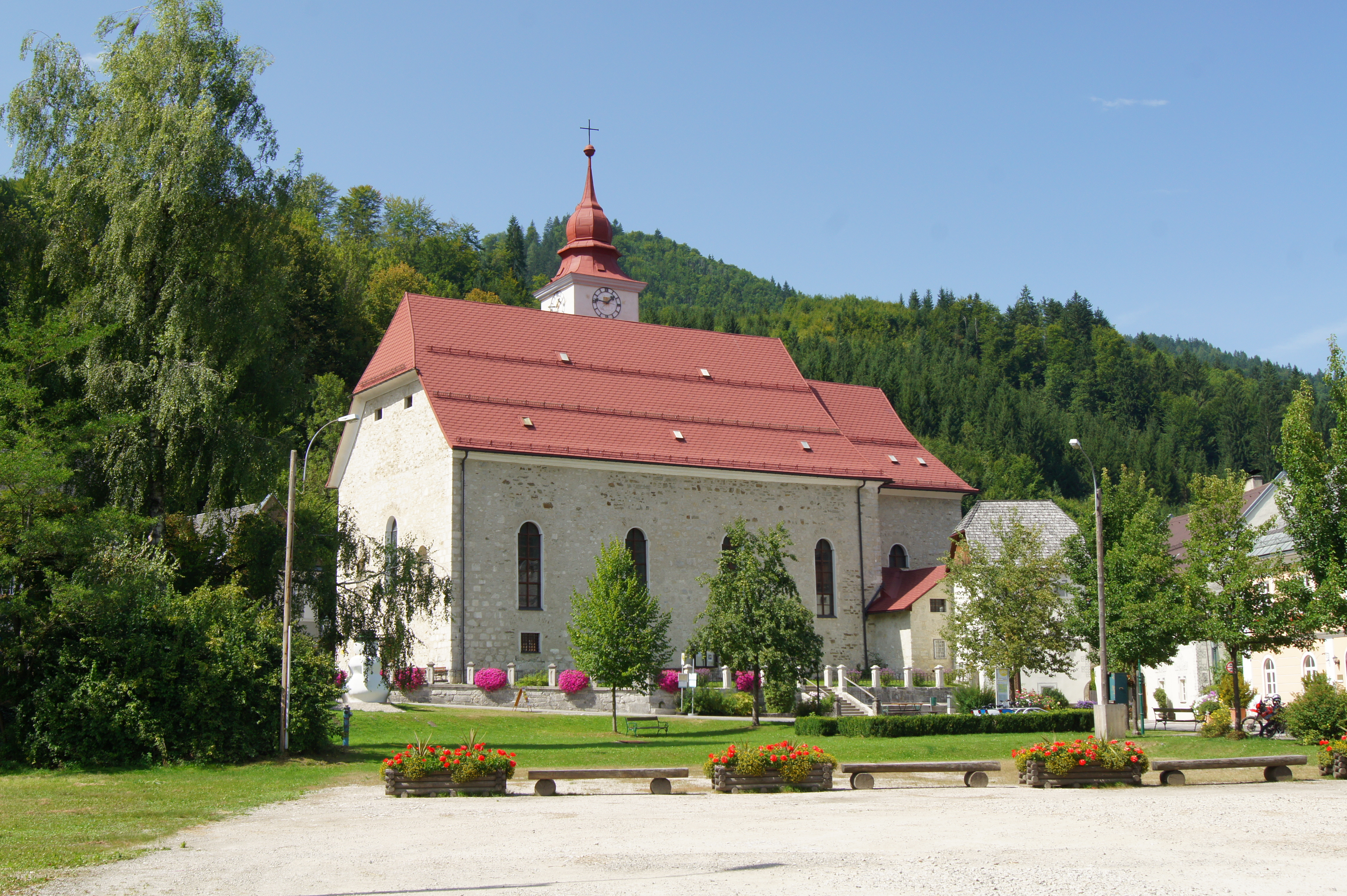 Kath. Pfarrkirche hl. Andreas